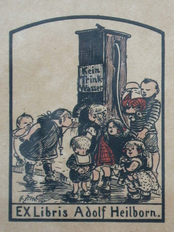 Heinrich Zille - Ex libris für Adolf Heilborn. Farblithographie, ca.10 x 15cm